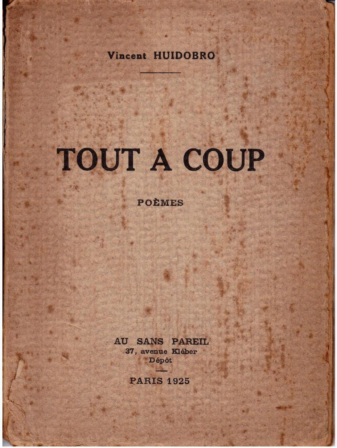 Tout a coup. Poémes de Vicente Huidobro. Editorial: Editions Au Sans Pareil, 1925